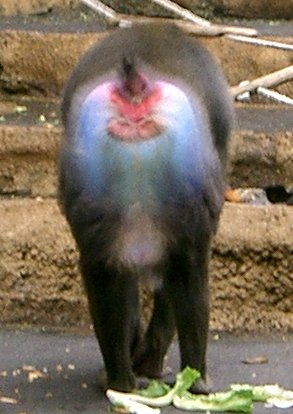 Mandrillmännchen von hinten im Zoo Dresden, 31.10.2004